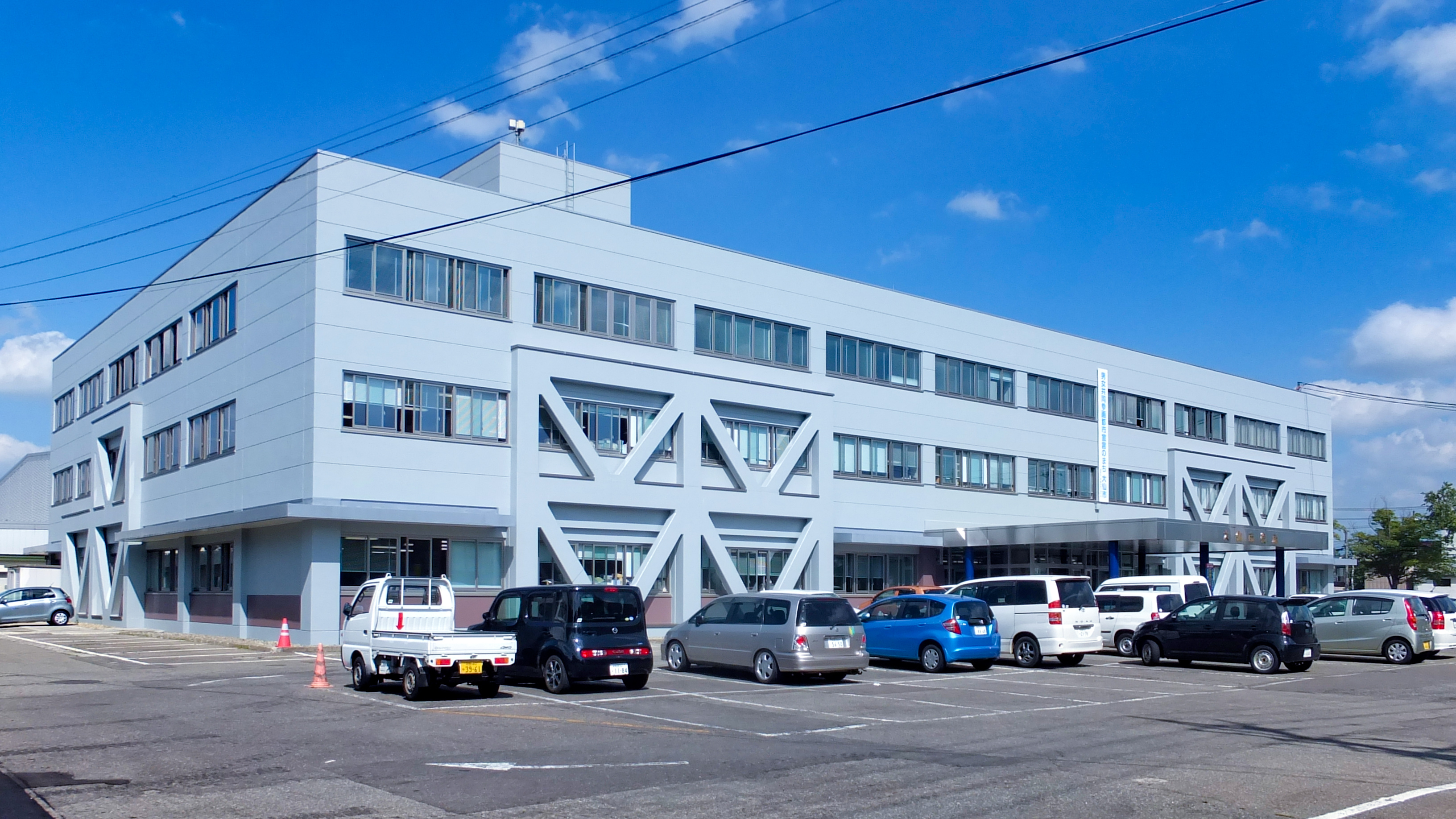 大仙市役所本庁舎